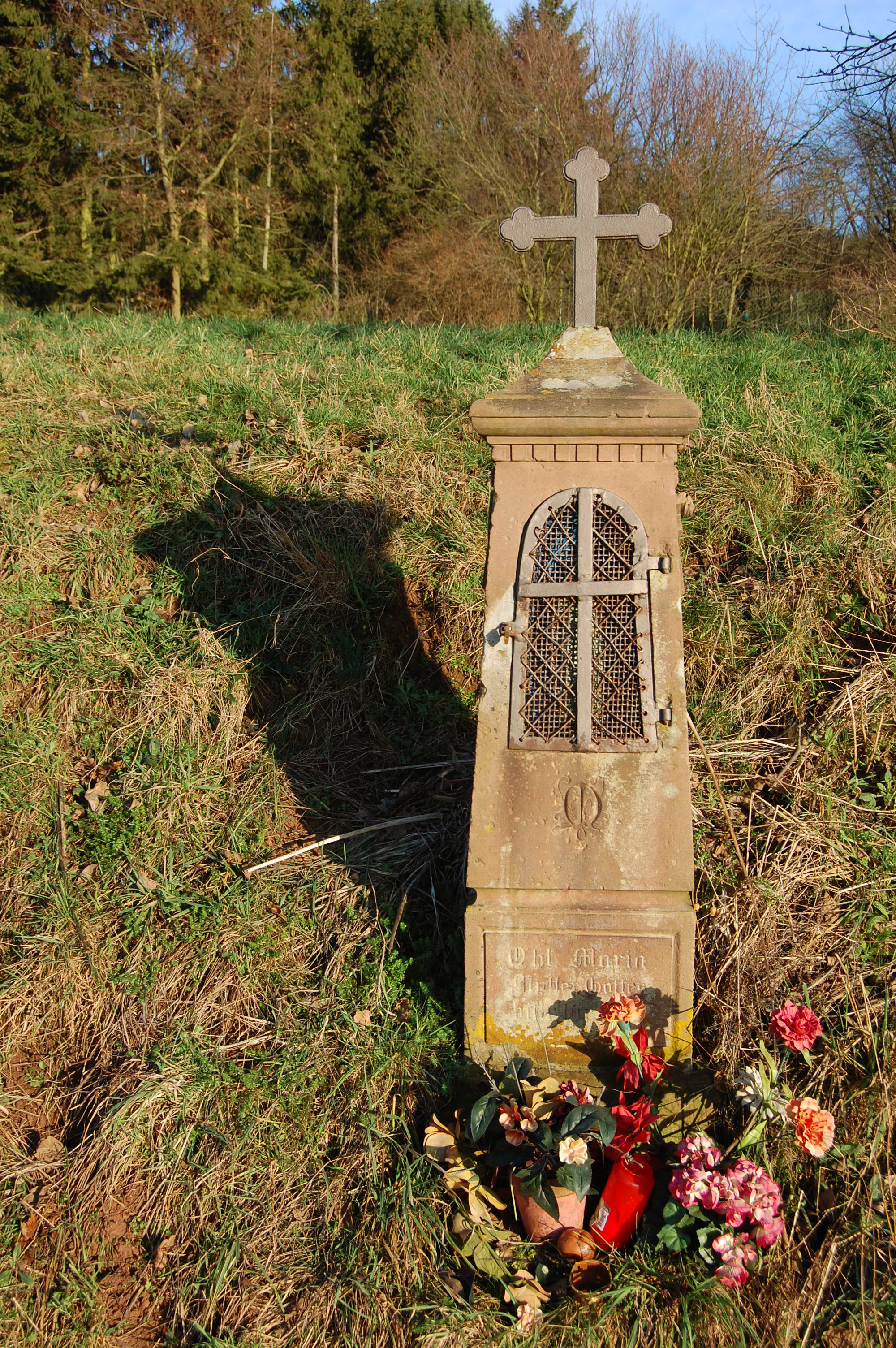 Kapliczka przy drodze